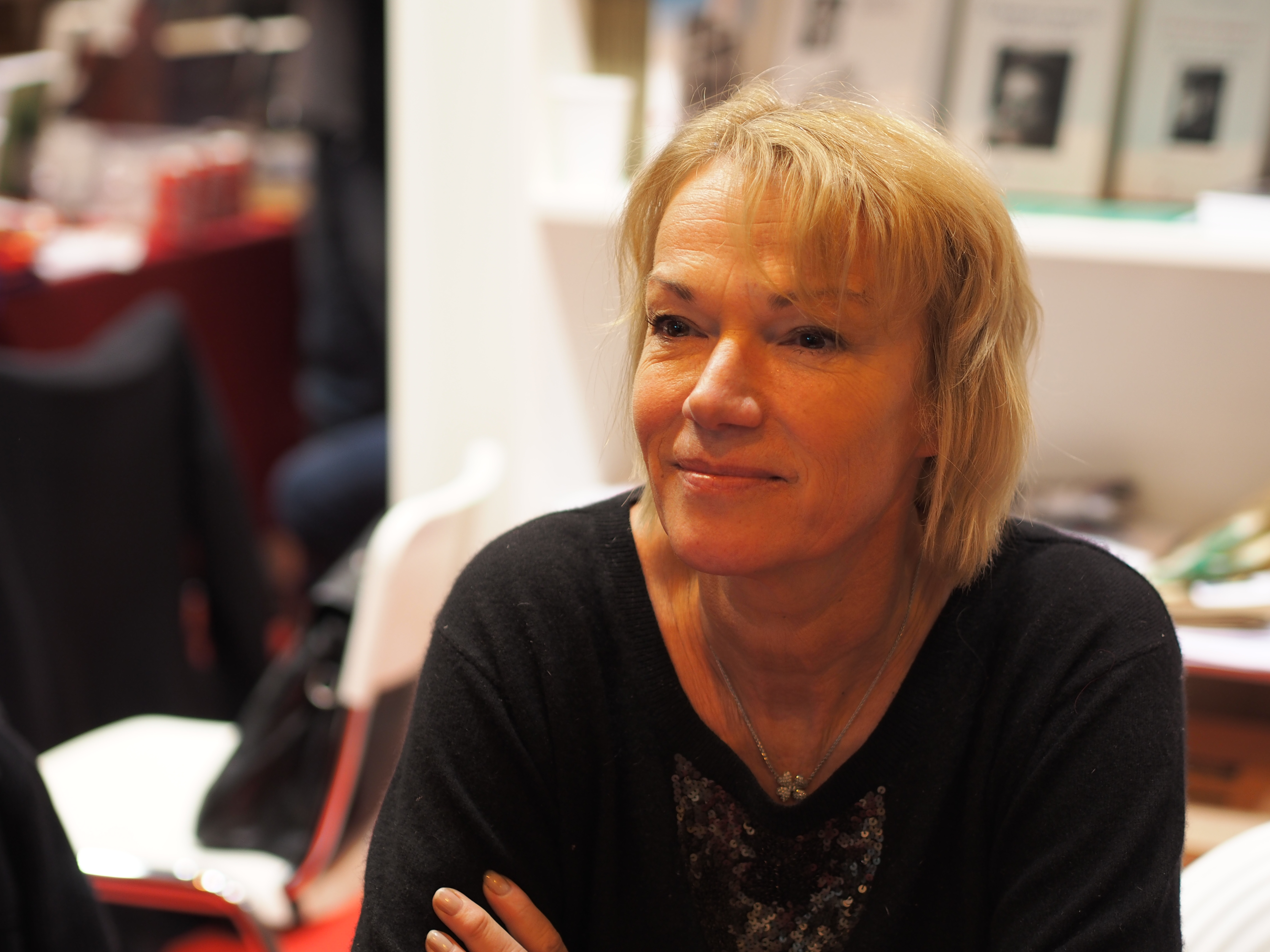 Brigitte Lahaie au au Salon du livre de Paris, le lundi 24 mars 2014.